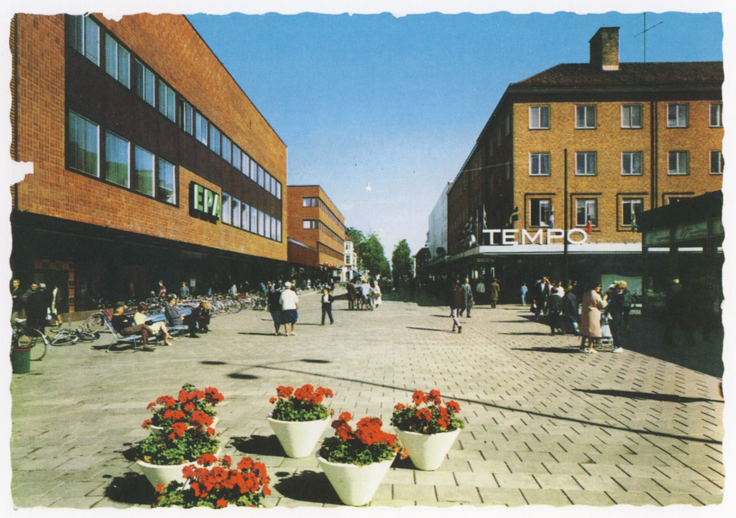 Umeå centrum. EPA-huset uppfört 1963. Arkitekter Ancker-Gate-Lindegren